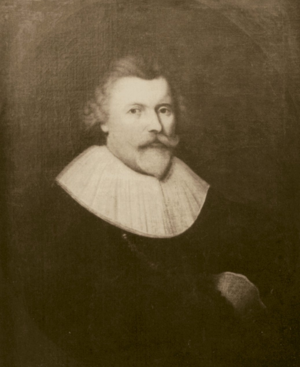 Friedrich von Fürstenberg (zeitgenössisches Gemälde)